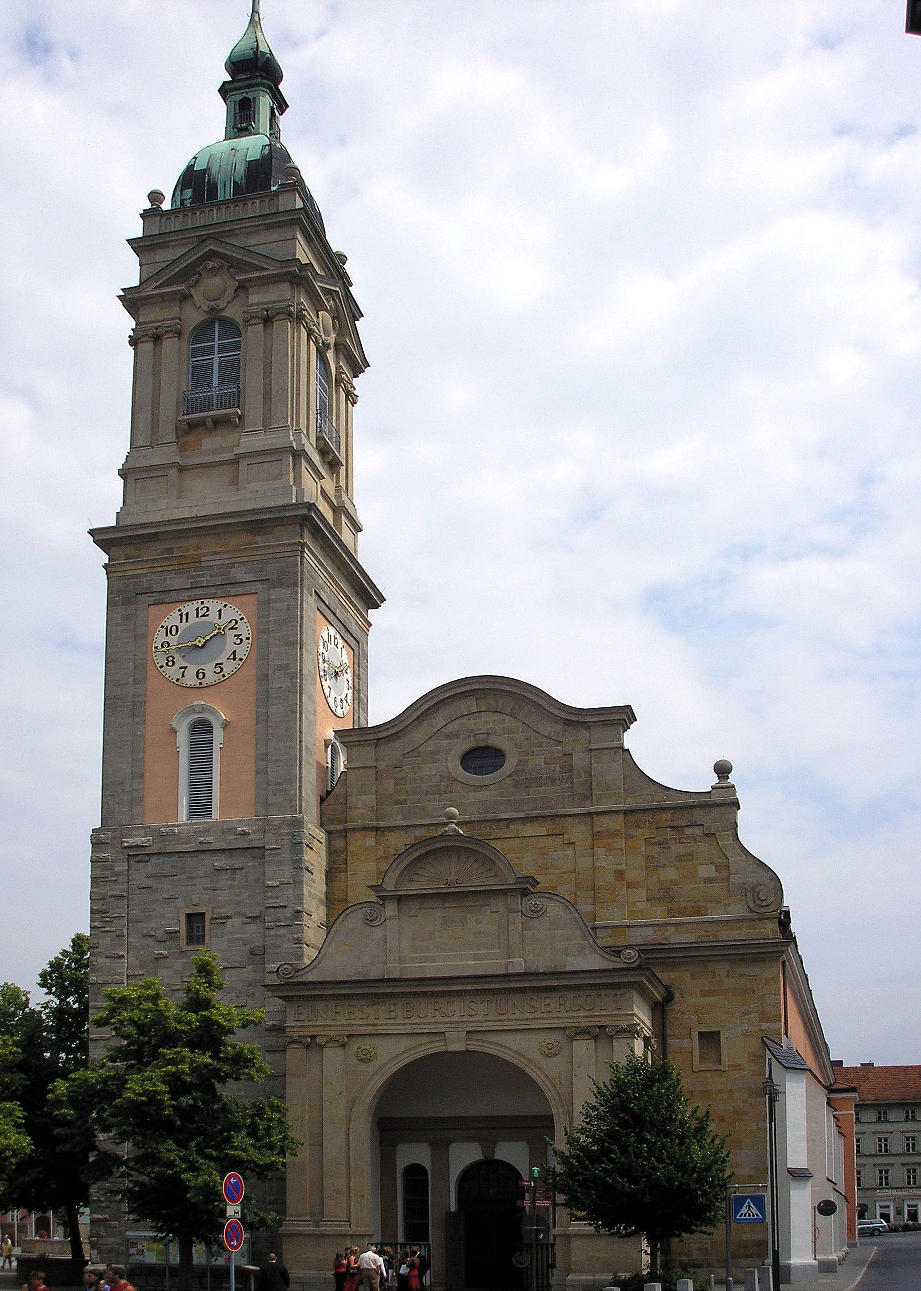 Die Eisenacher Stadtkirche